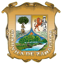 Escudo del Estado de Coahuila